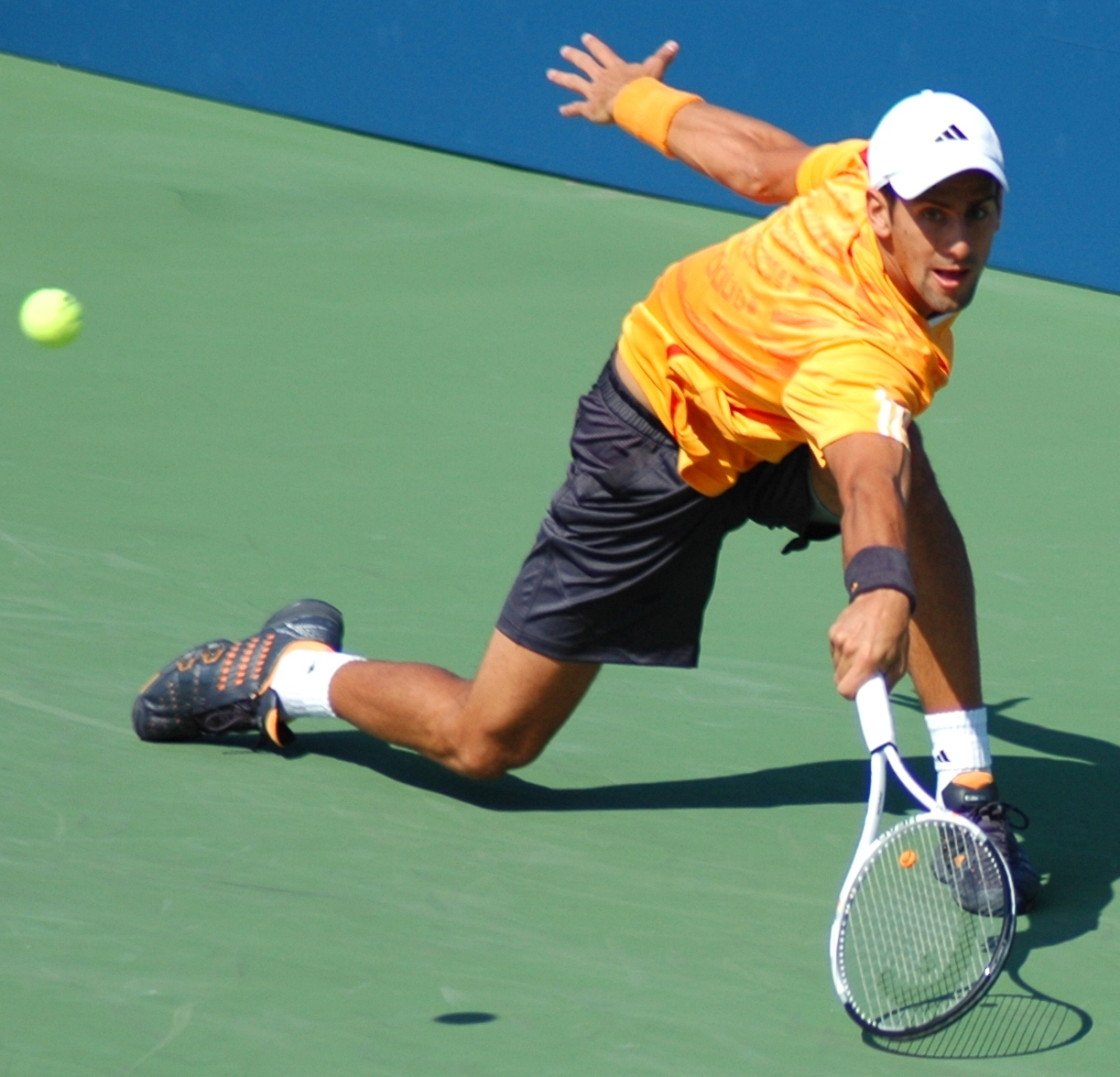 Novak Djokovic US Open 2009